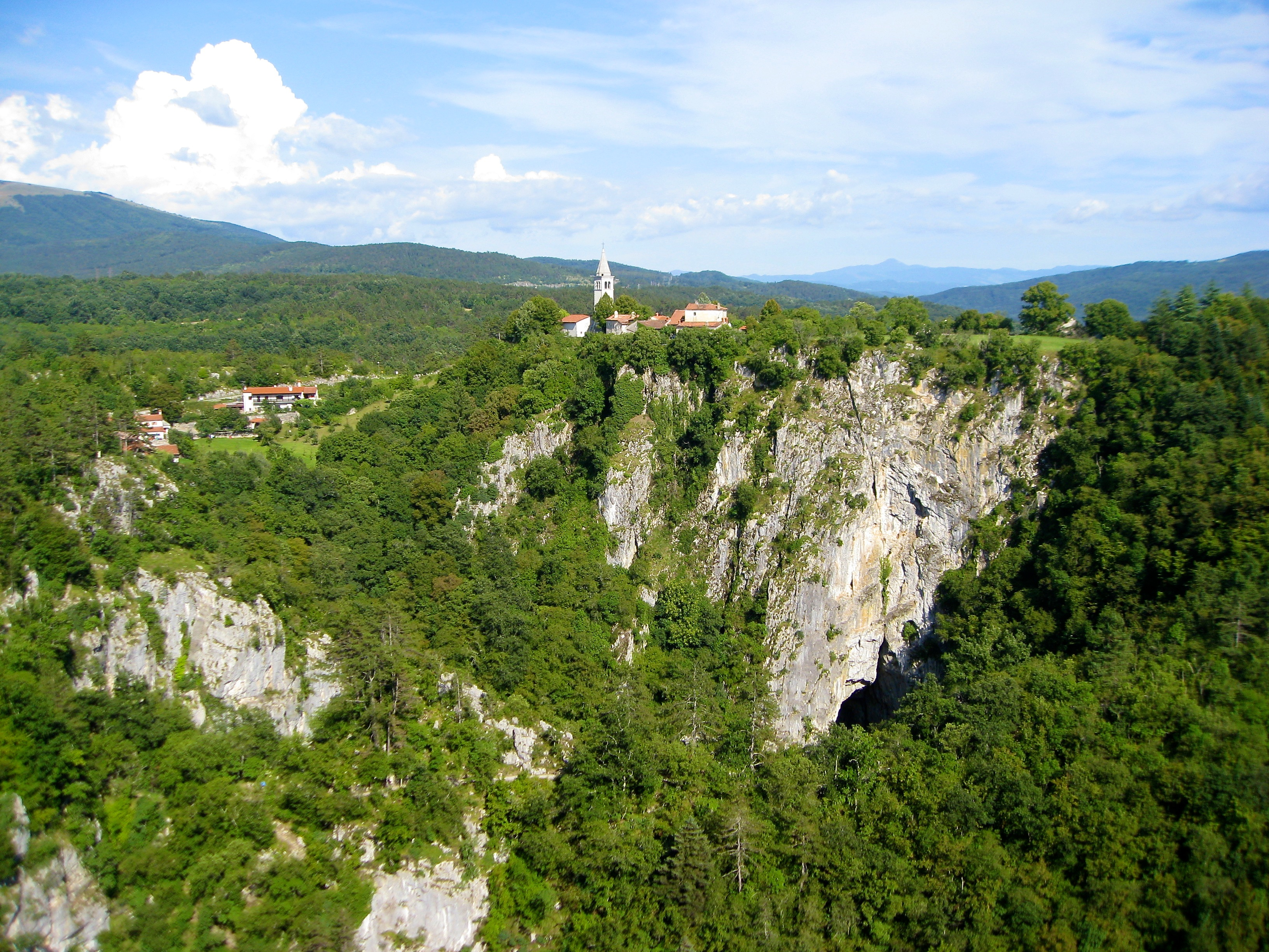 Grutas de Škocjan 003